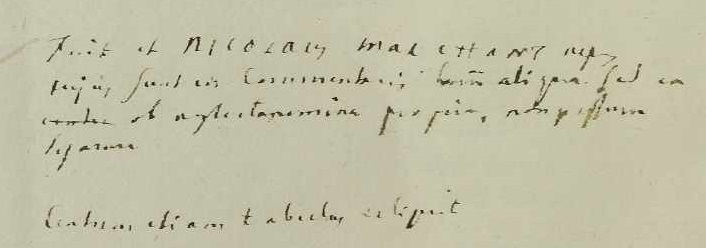 Note manoscritte di Albrecht von Haller